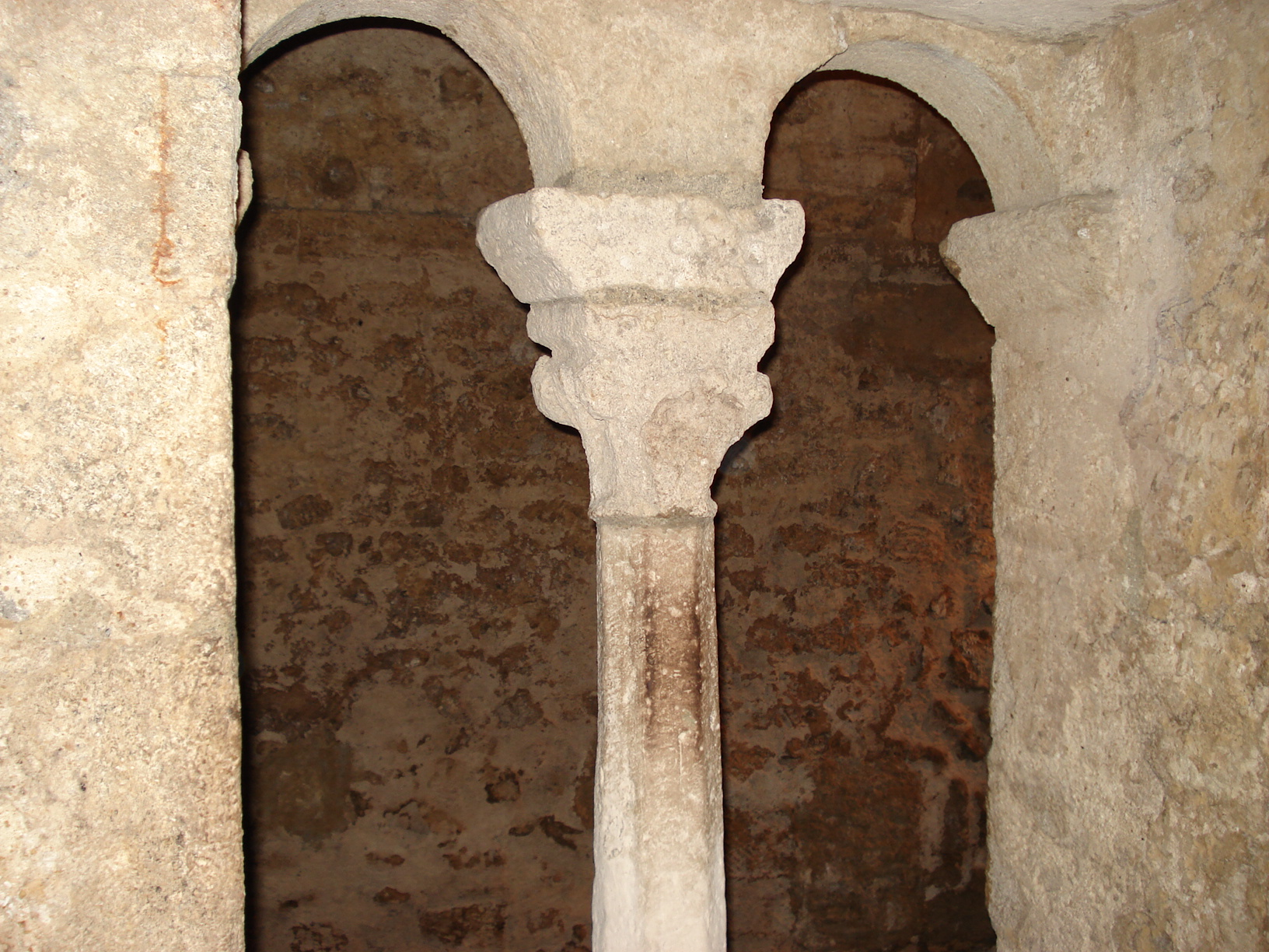 Montpellier (Hérault) - Fenêtre située dans le Mikveh.